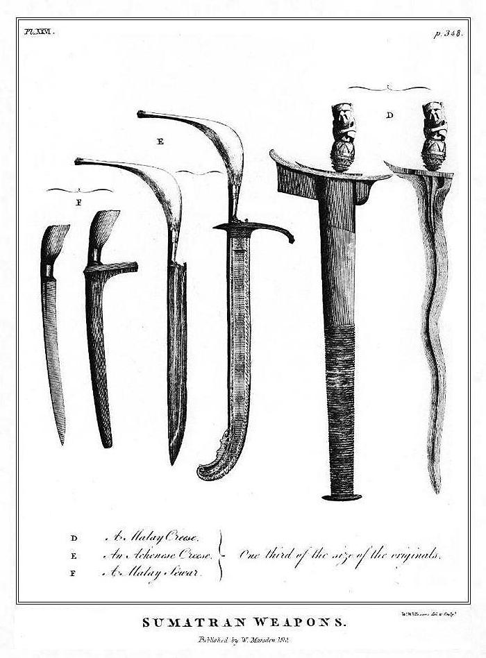 William Marsden: The History of Sumatra. Tafel XXVII: Sumatran Weapons